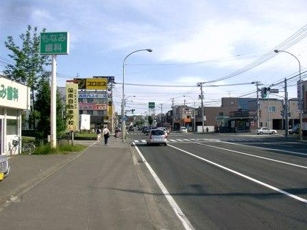 川沿地区